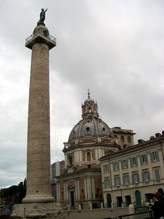 Roma - Colonna Traiana